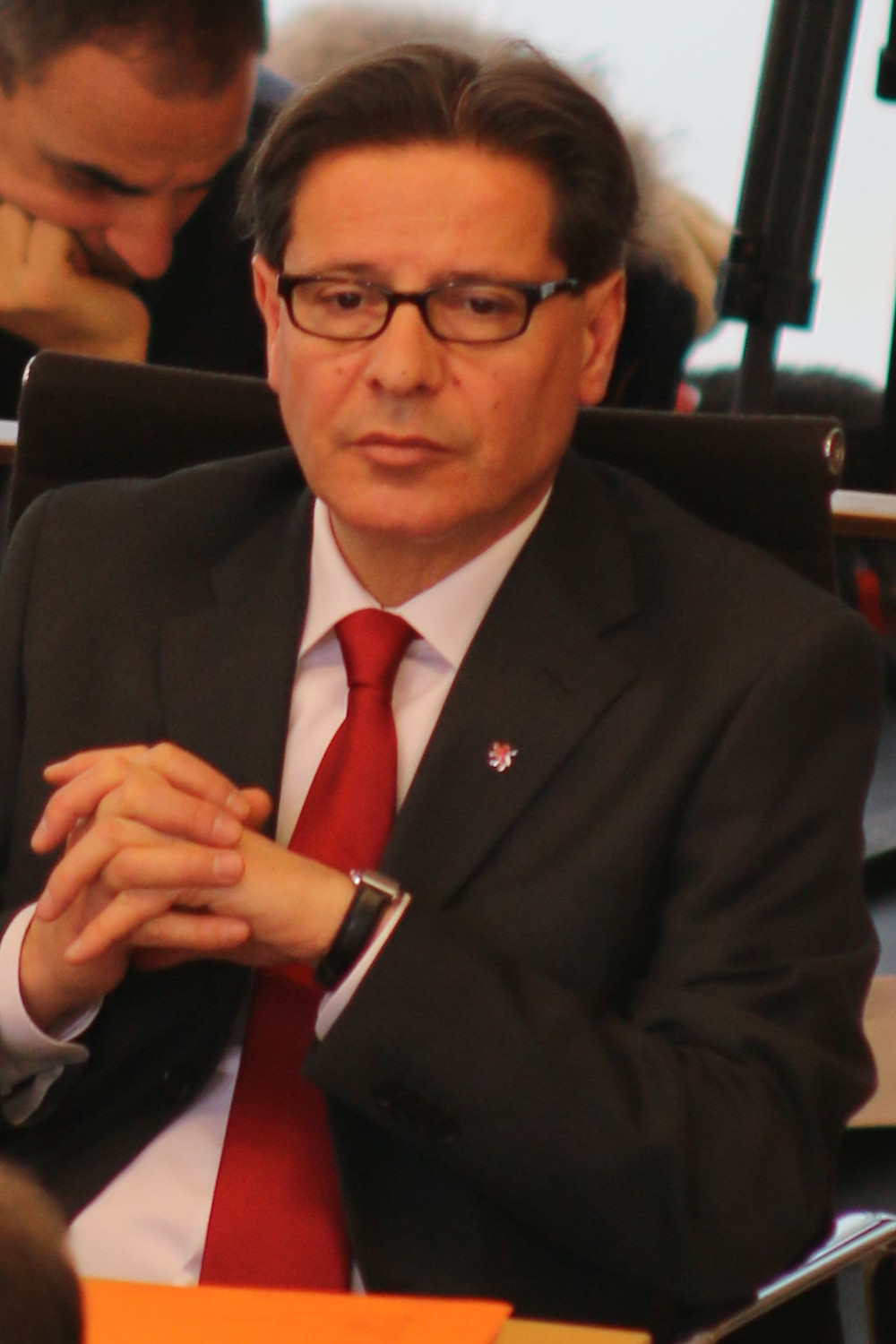 Konstituierende Sitzung des Hessischen Landtags 2014: Corrado Di Benedetto (MdL) von der SPD-Fraktion